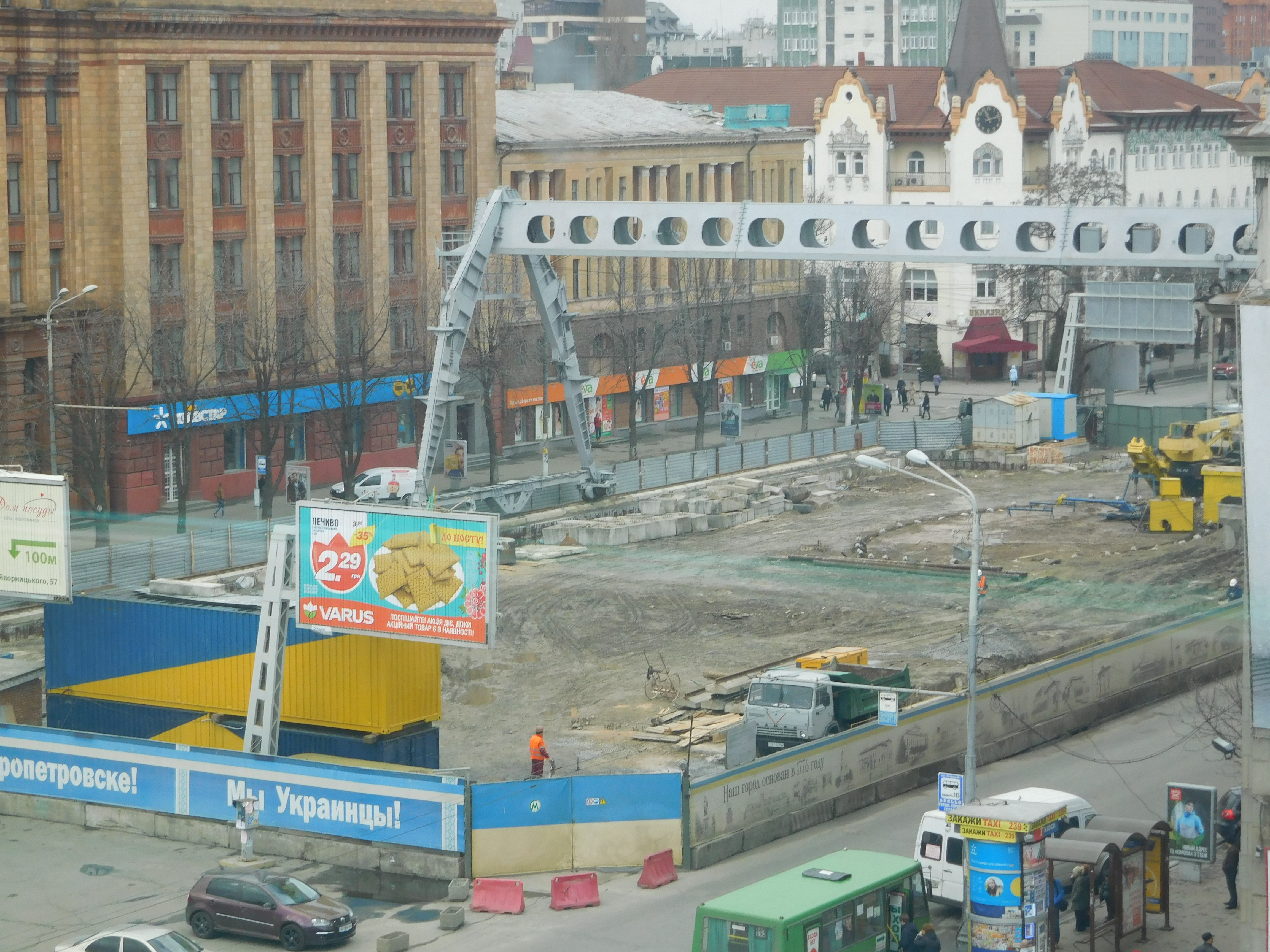 Строительство станции метро Центральная по состоянию на 20 марта 2017